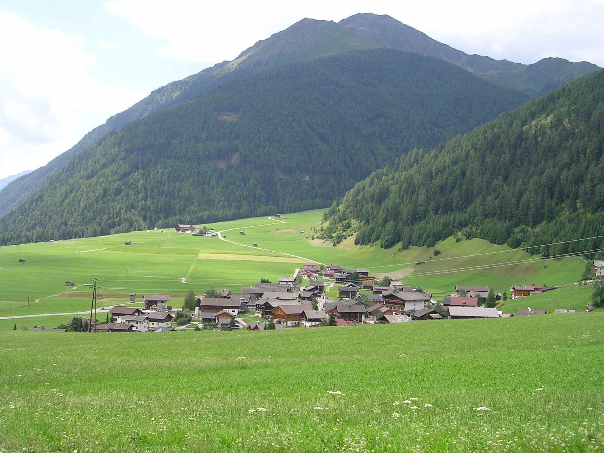 Großdorf, Fraktion der Gemeinde Kals am Großglockner. Aussicht auf das Dorf oberhalb von der Frakzion Burg